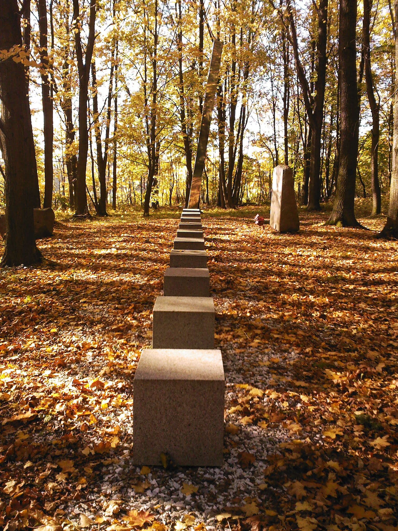 335 01 Prádlo, Czech Republic